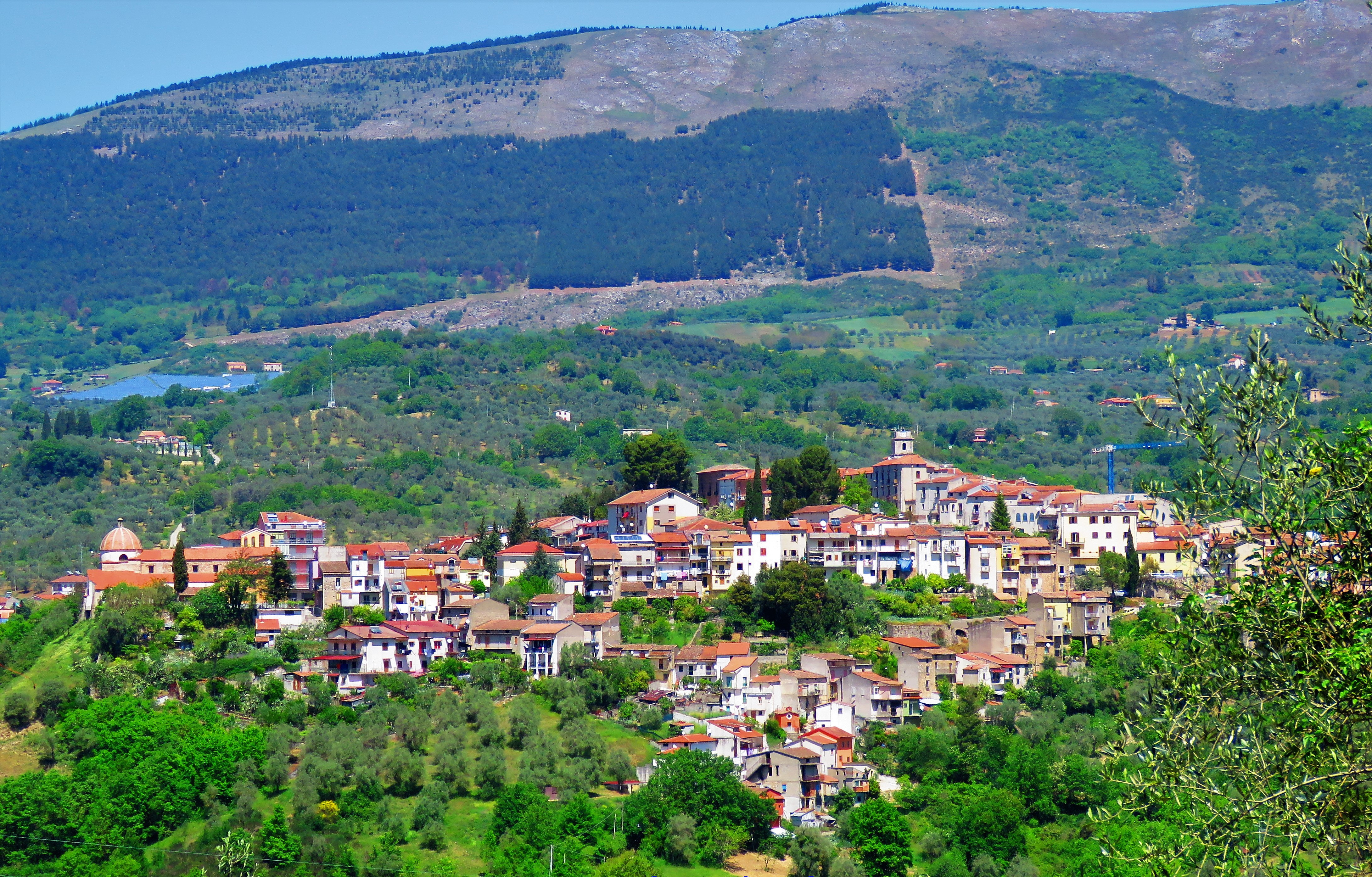 Auletta